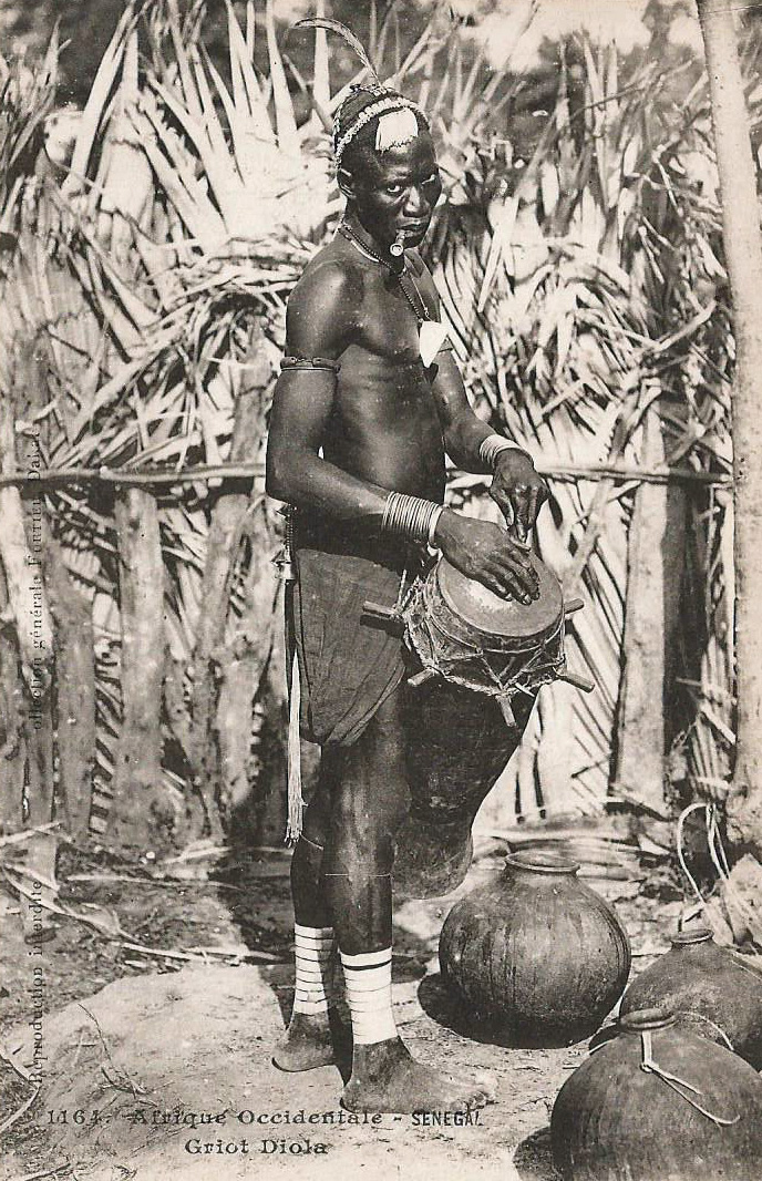 François-Edmond Fortier, Sénégal. Griot Diola . Afrique Occidentale. Sénégal